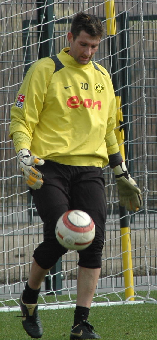 Bernd Meier beim Training von Borussia Dortmund nach seinem Kreuzbandriss